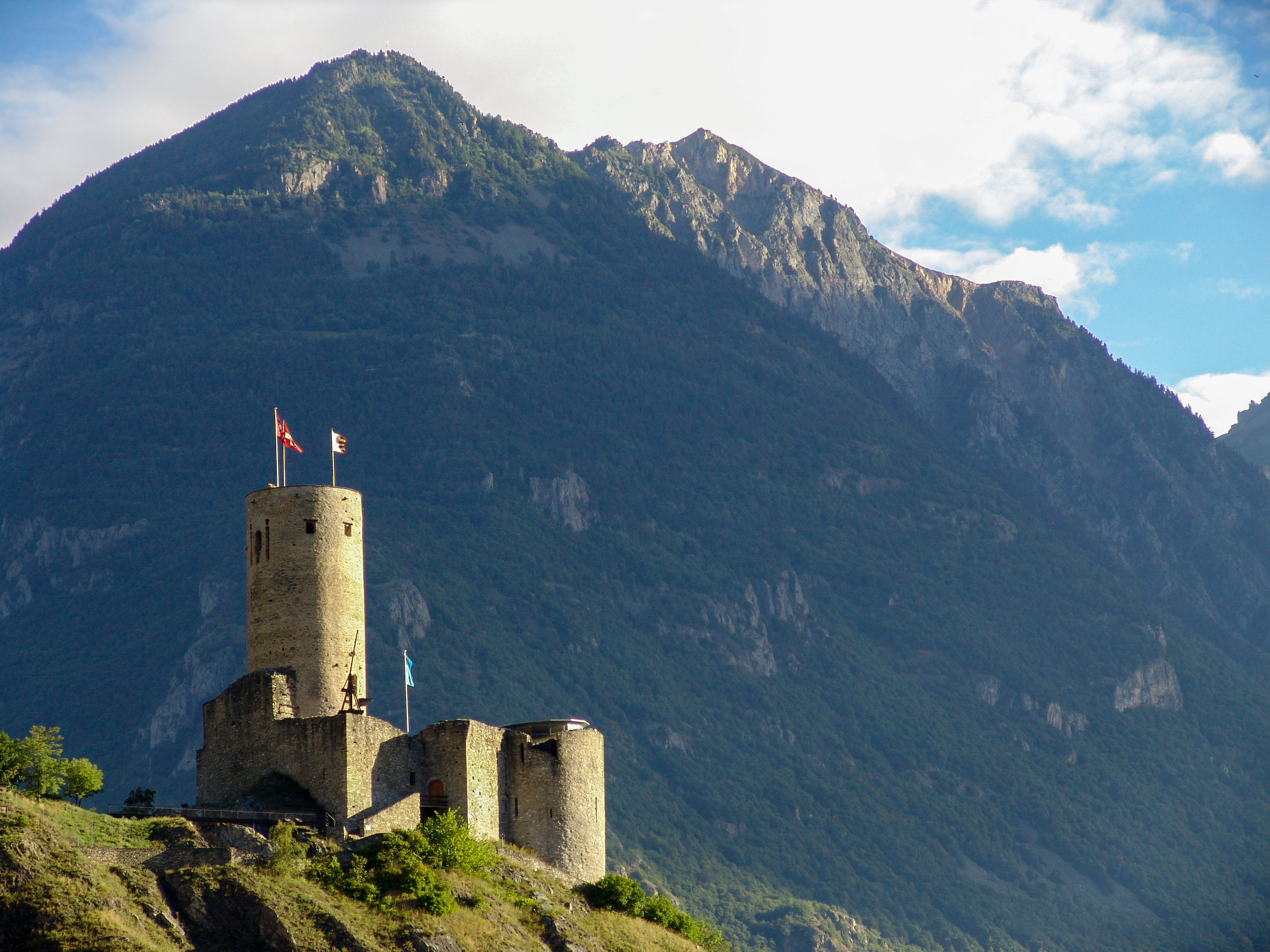 Burg La Bâtiaz